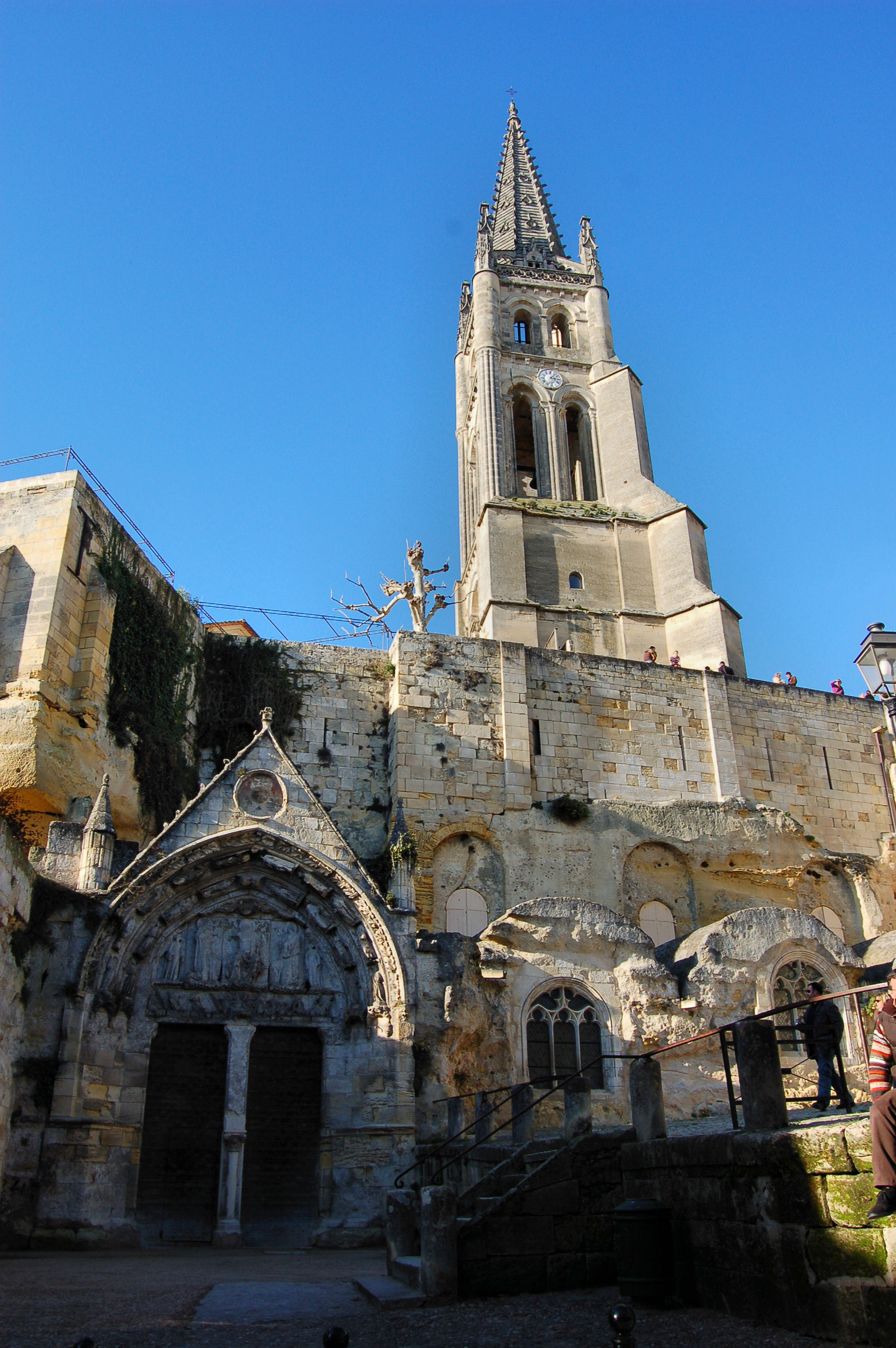 Eglise mololithe de Saint Emilion (Gironde, France)